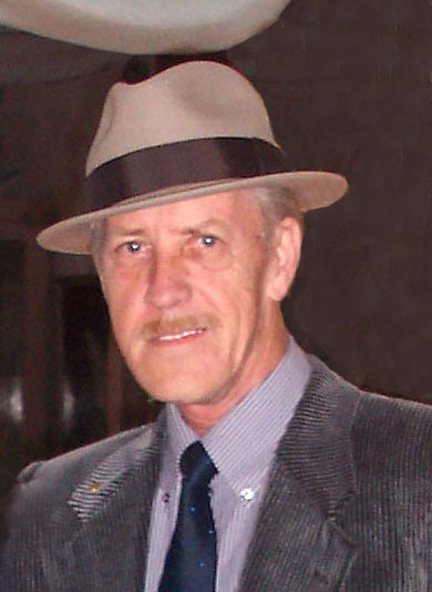 Baron von Lind